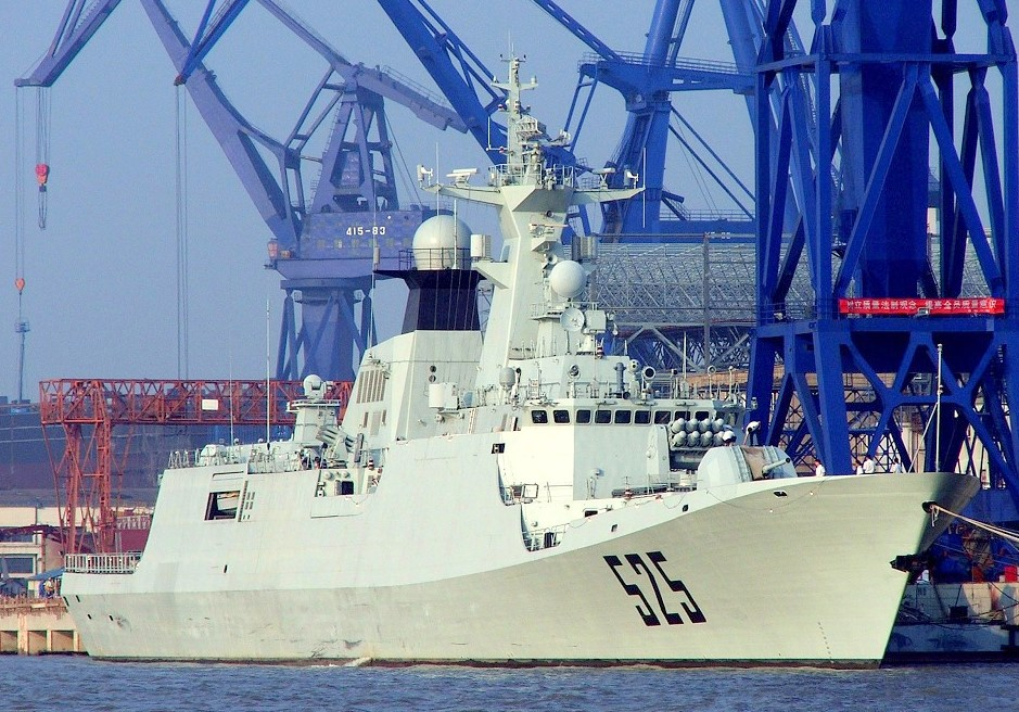 中文（中国大陆）: “马鞍山”号导弹护卫舰。